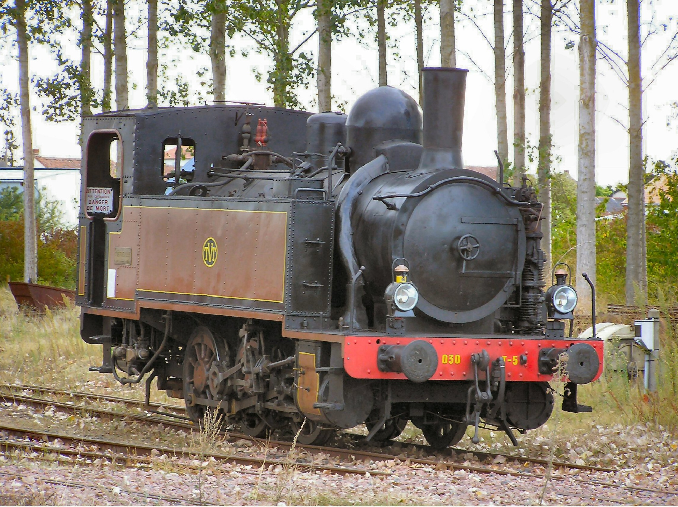 locomotive à vapeur